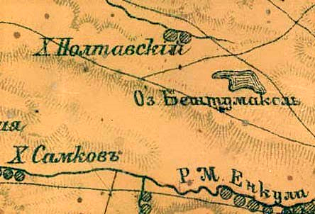 Фрагмент «Карты Ставропольской губернии составленной при ставропольской губернской чертёжной по новым сведениям по указаниям и под непосредственным наблюдением ставропольского губернатора, генерал-майора Н. Е. Никифораки в 1896 году»